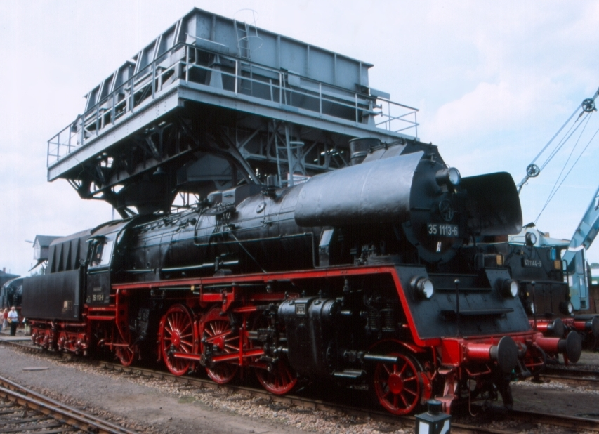 Dampflokomotive Baureihe 35 1113.